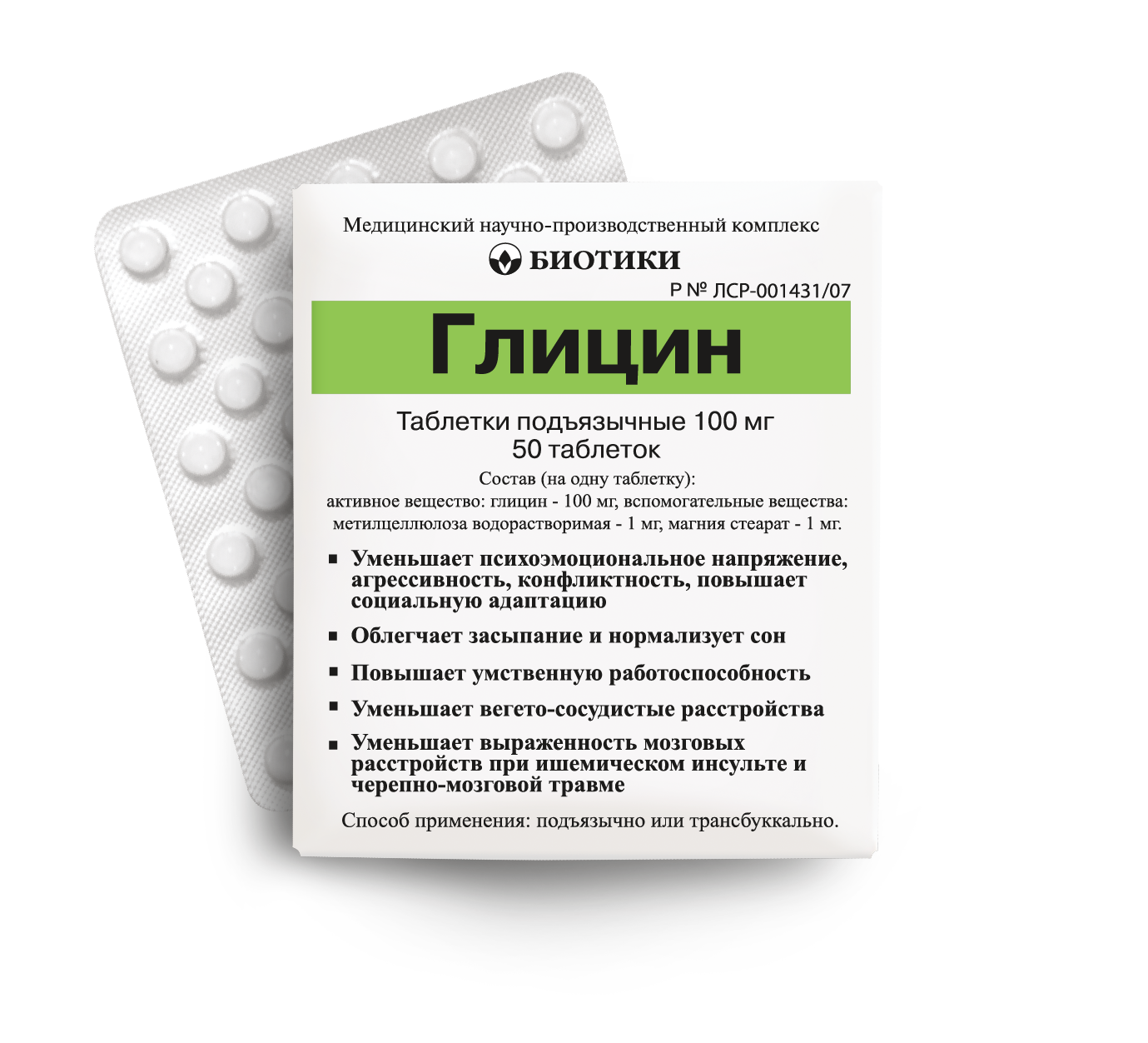 Глицин Биотики